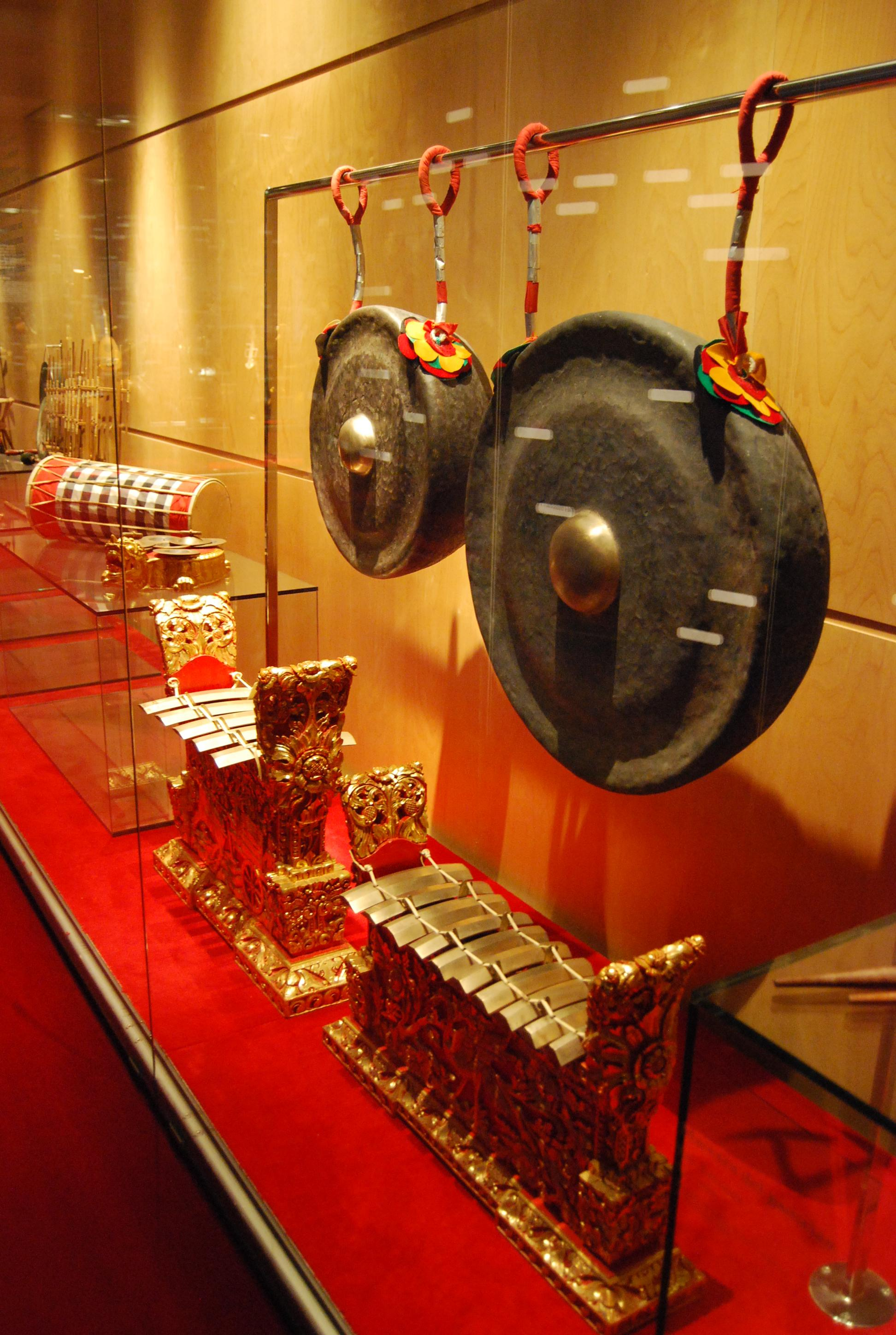 Gamelan in the Museu de la Música de Barcelona